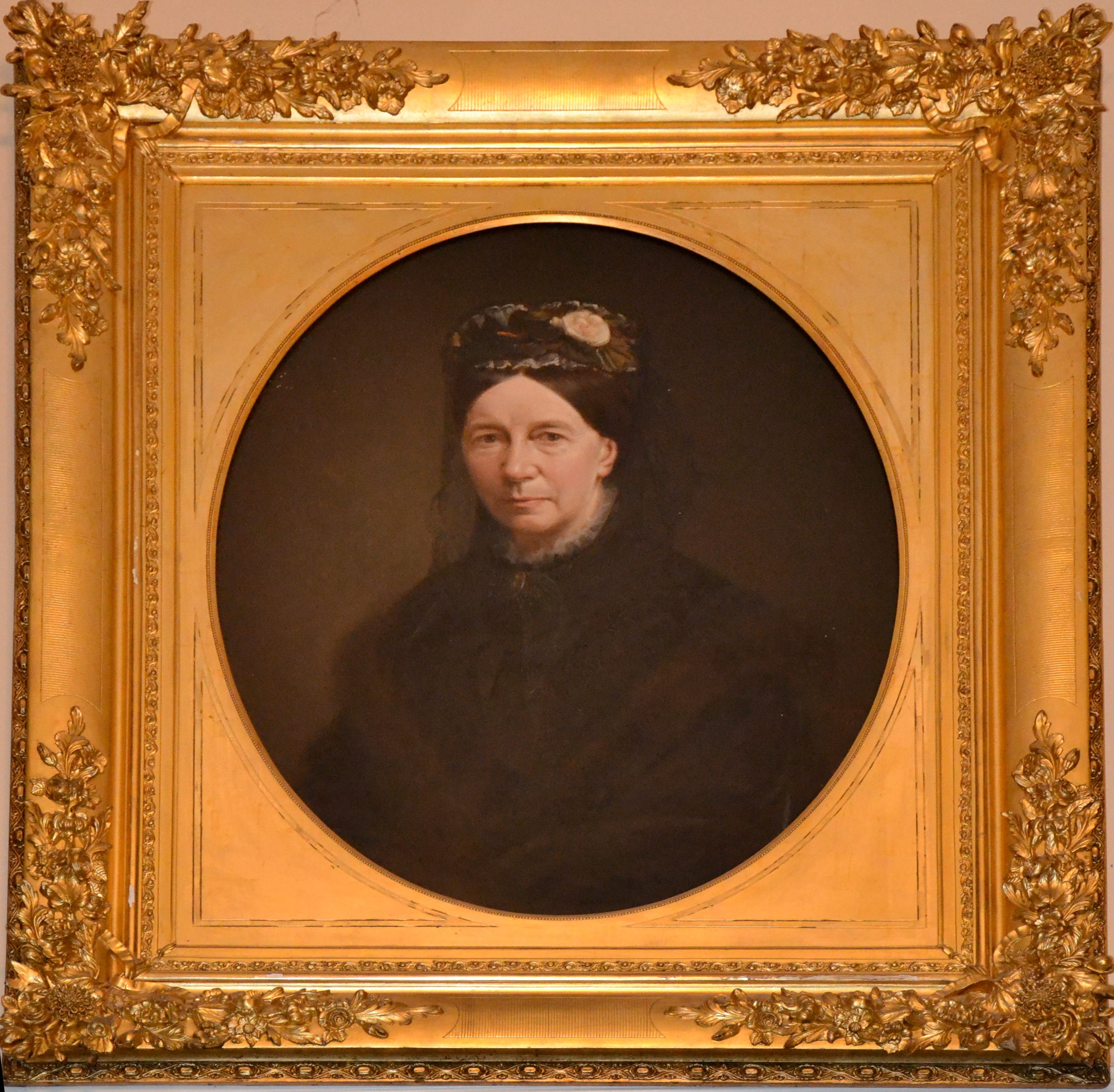 Marie-Henriette Louise Félicité Jeanne Ghislaine Tiberghien (1880-1935)